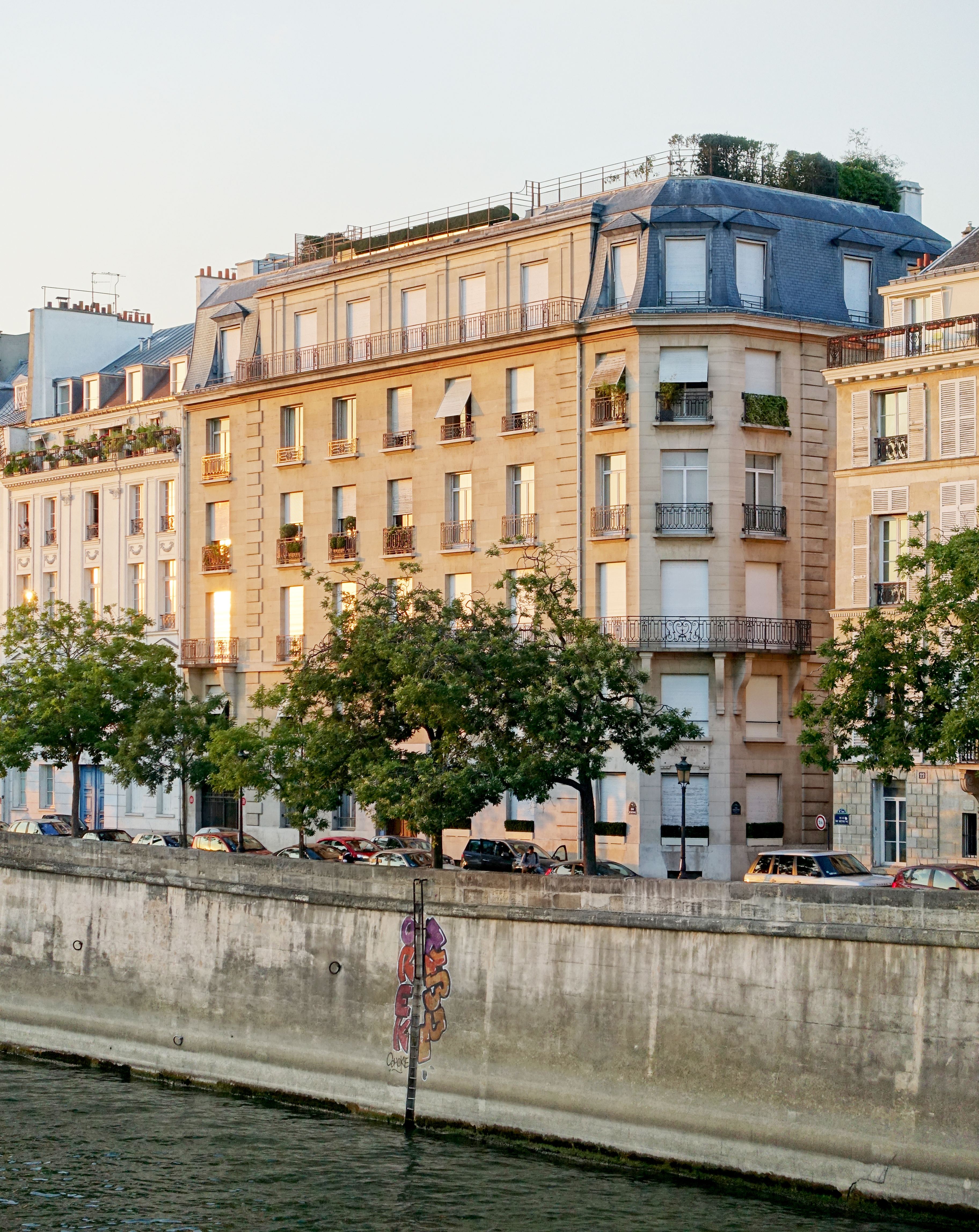 Hôtel d'Hasselin, 24 quai de Béthune, Île Saint-Louis, Paris, France.